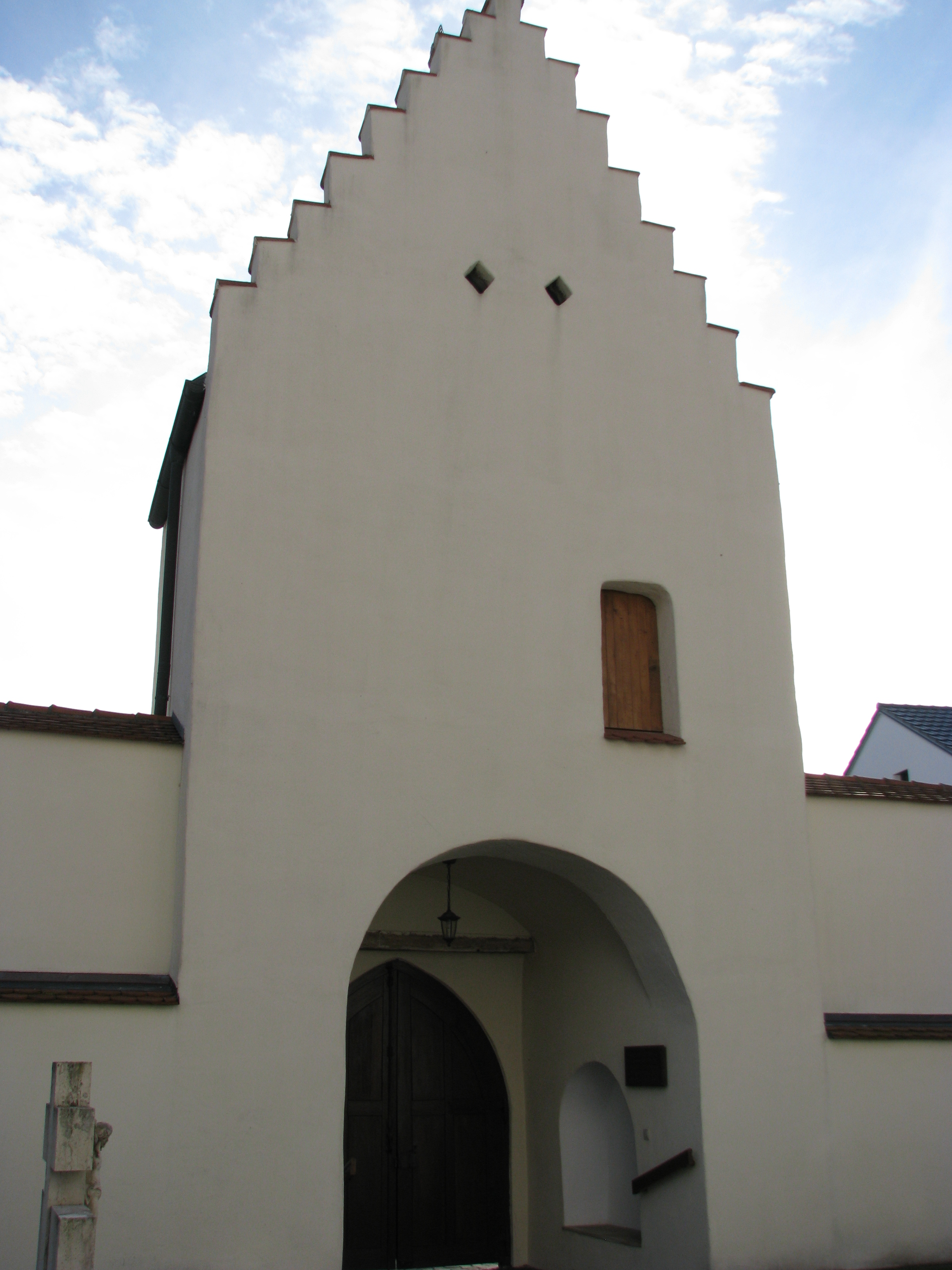 Röckenhofen, Ortsteil von Greding im mittelfränkischen Landkreis Roth in Bayern, Innenseite des Torturms der Wehrkirchenanlage St. Ägidius